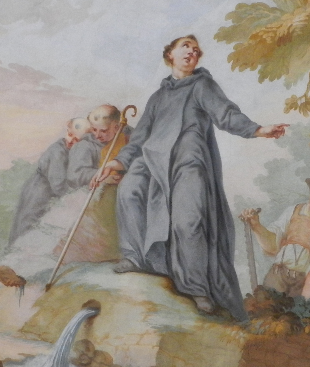 Der heilige Alto erweckt die Altoquelle. Ausschnitt aus dem Deckenfresko des Beichtraums der Kirche St. Alto und St. Birgitta in Altomünster, Oberbayern, Deutschland, etwa 1766–1768.